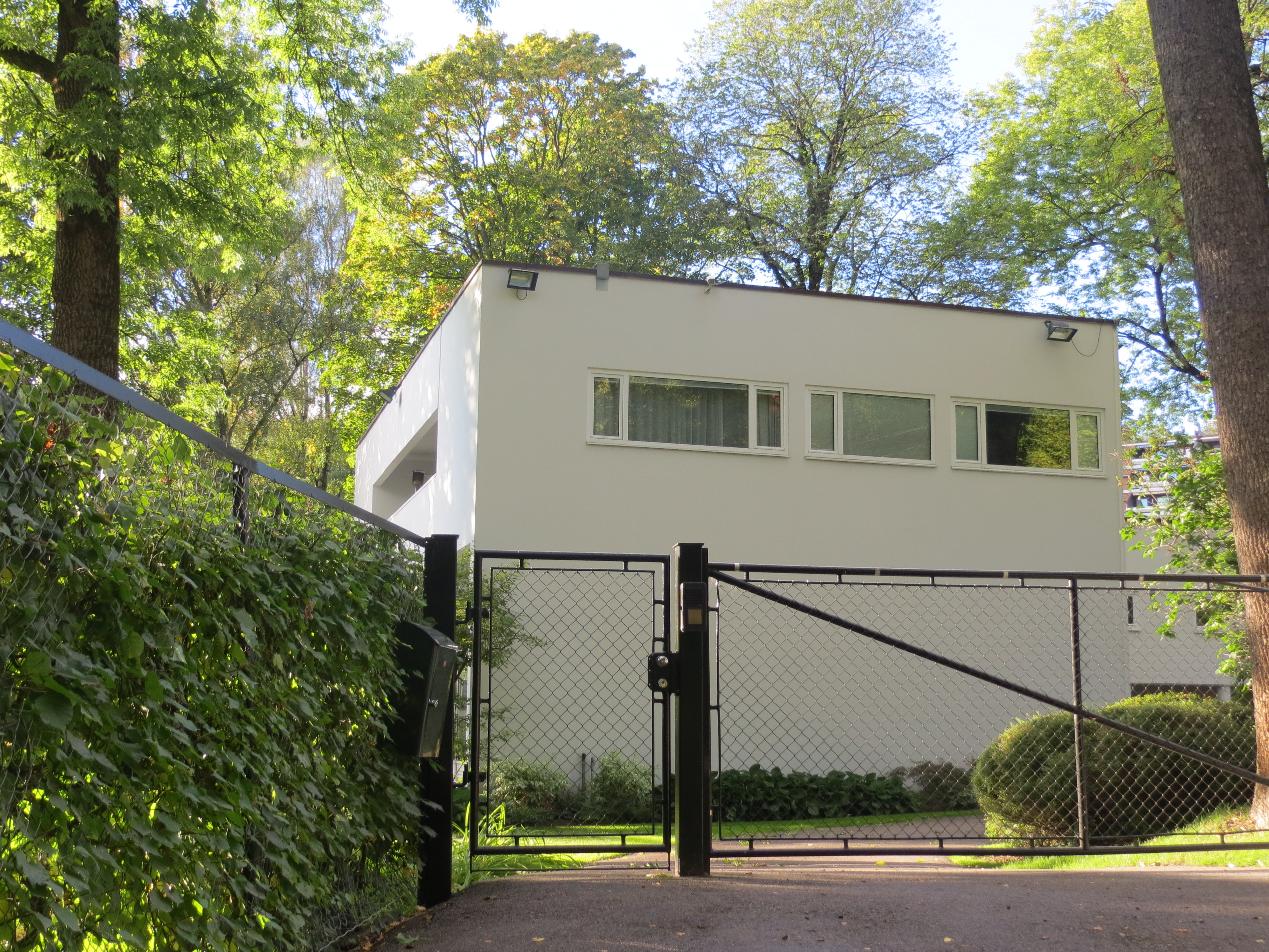 Kommunalt vernet funkisvilla i Hoffsjef Løvenskiolds vei på Ullernåsen i Oslo.